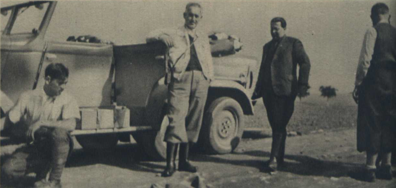 "Budova, v ktorej sídli slovenské posádkové veliteľstvo v ľa kopanom."